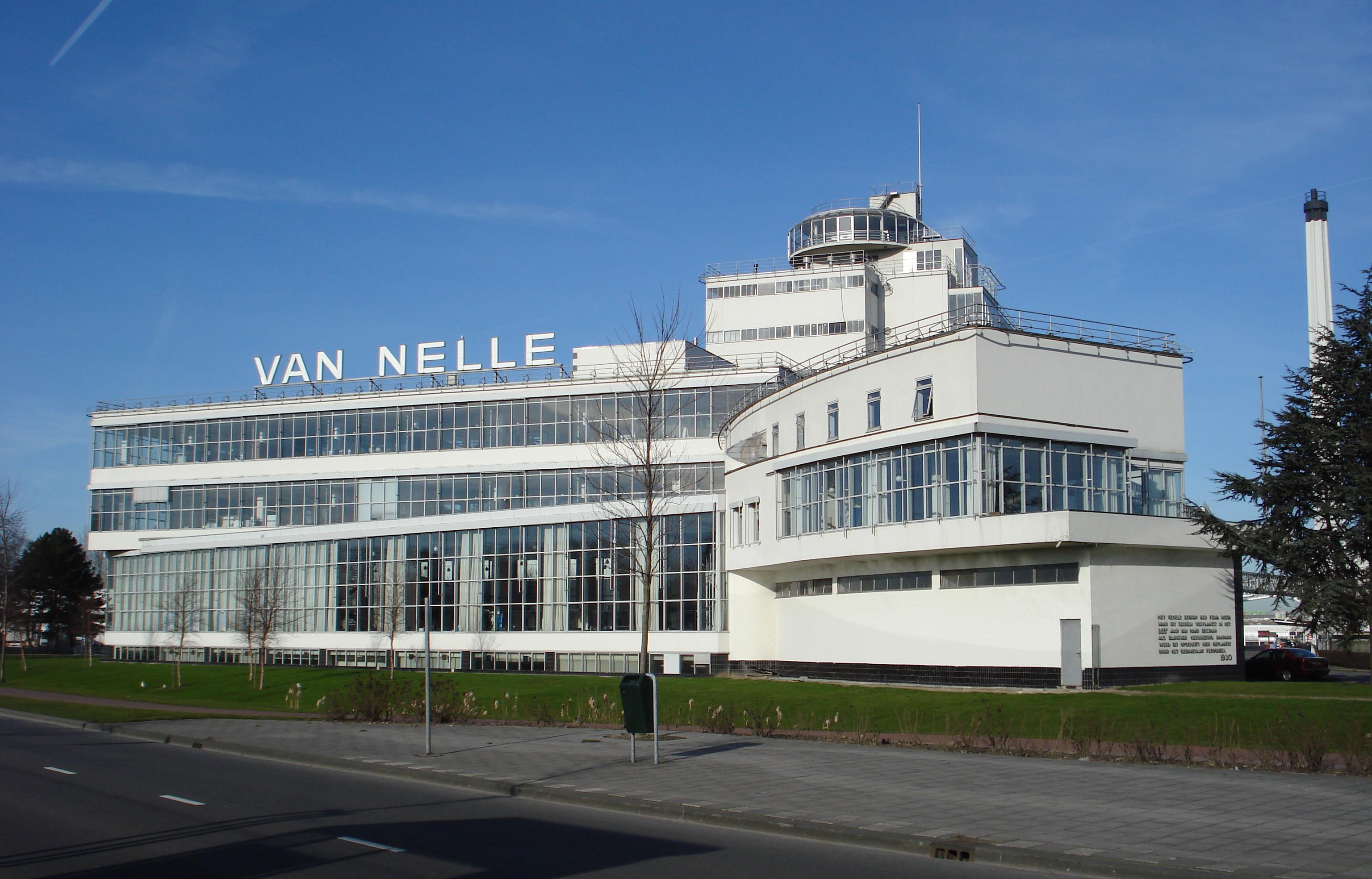 Rotterdam, Van Nelle fabriek. Rijksmonument.